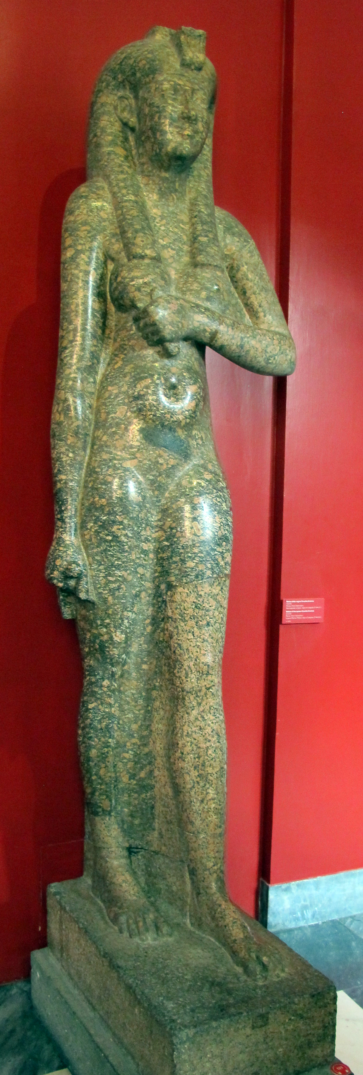 Museo Gregoriano Egizio